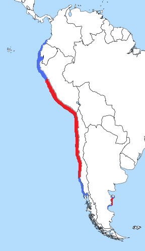 Mapa de distribución del cormorán guanay (Leucocarbo bougainvillii = Phalacrocorax bougainvillii). Rojo: todo el año; azul: área sólo de alimentación o invernada. Colores aptos para daltónicos. Unknown